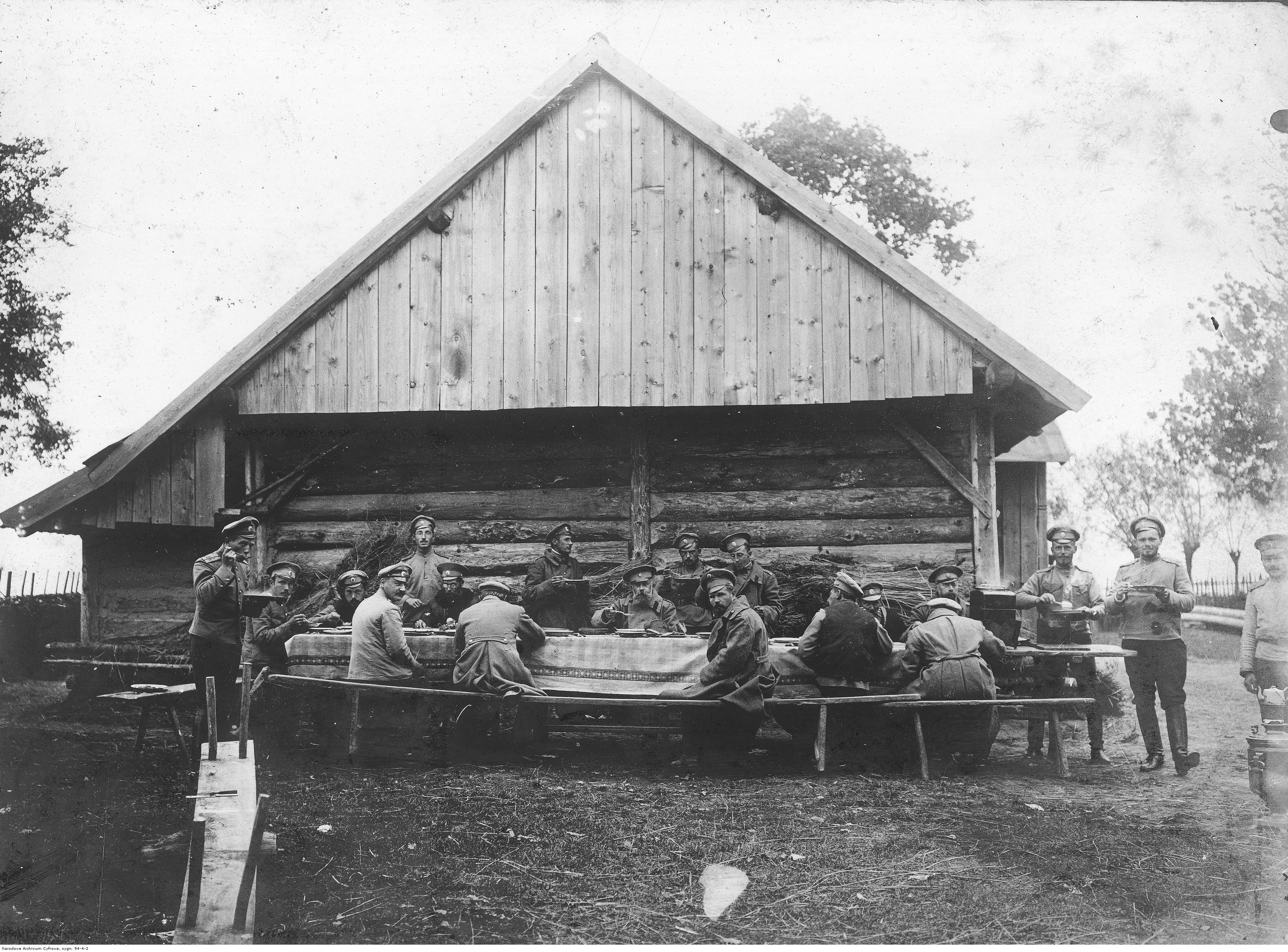 Oficerowie podczas posiłku przed wiejskim domem. Wśród siedzących: Ignacy Fudakowski (3. z lewej), płk Rakowicz (6. z lewej).